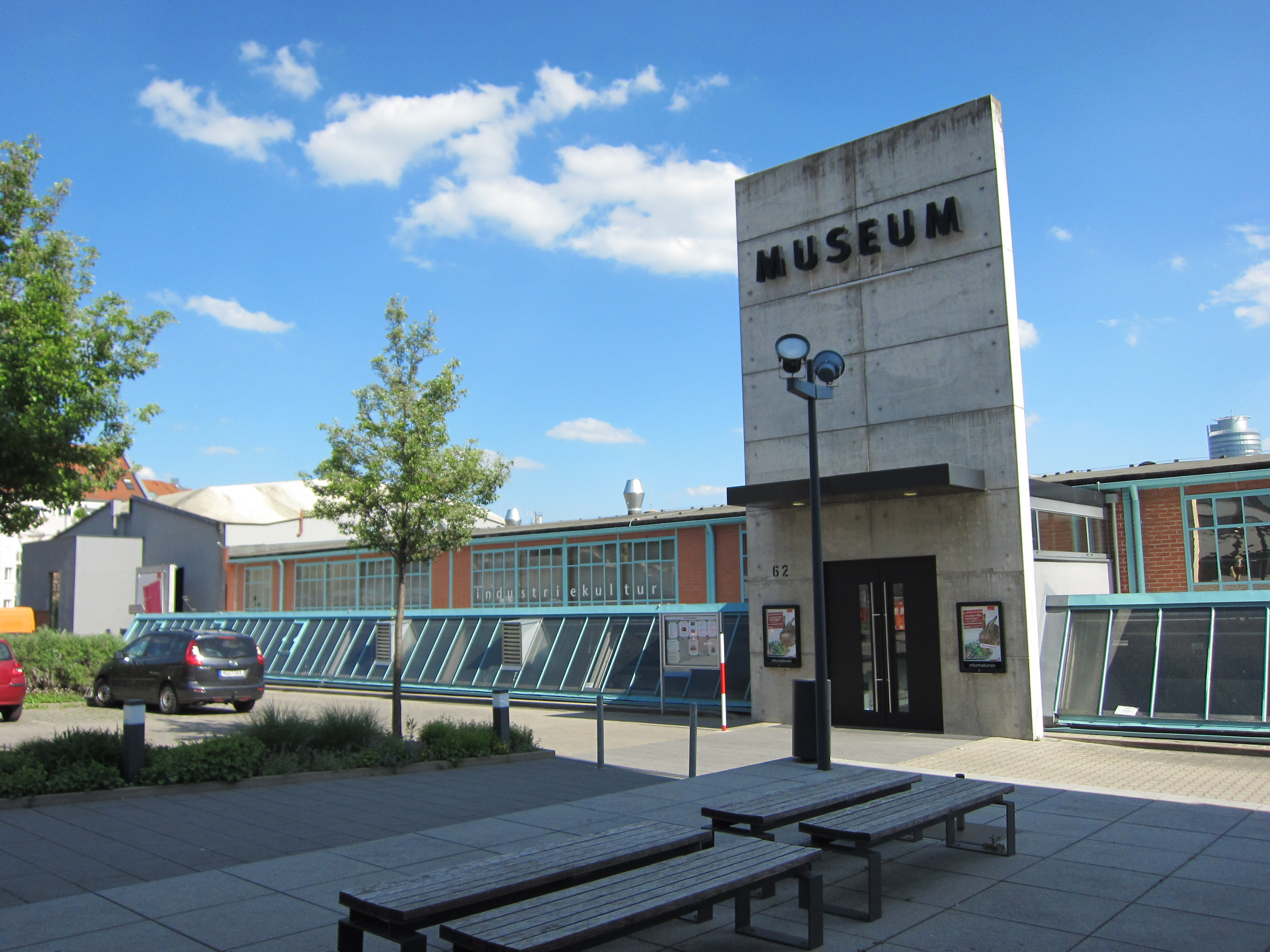 Museum Industriekultur Nürnberg, Äußere Sulzbacher Straße 62